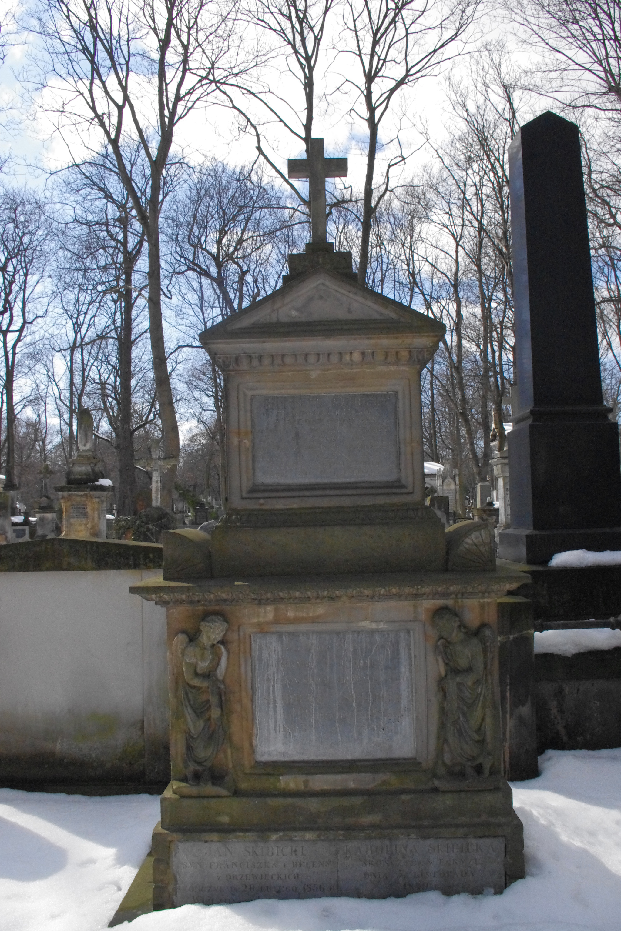 Grób ochmistrza dworu carskiego Franciszka Skibickiego (1796-1877) na Cmentarzu Powązkowskim w Warszawie